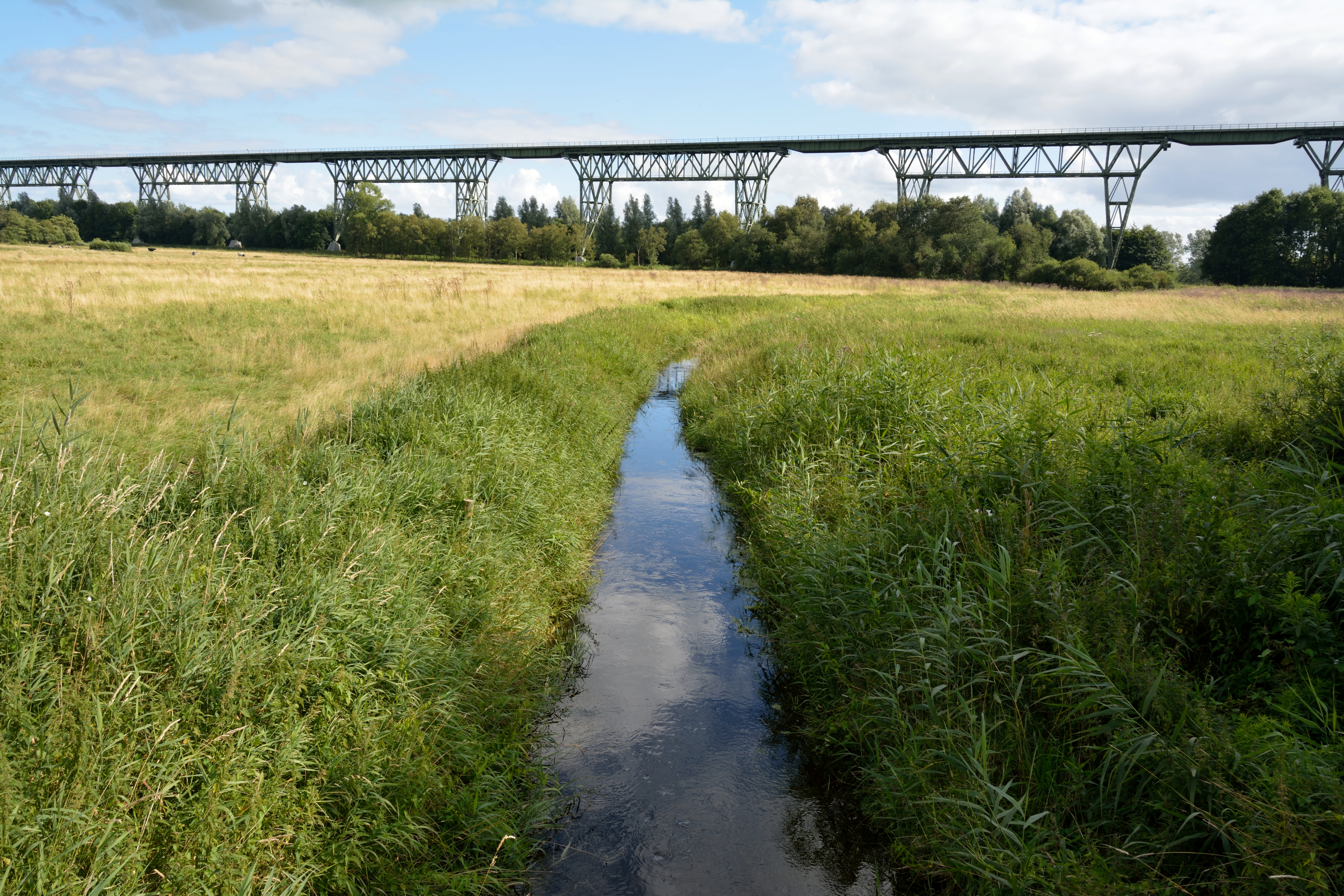 Impressionen der Holstenau an der Landesstraße L327